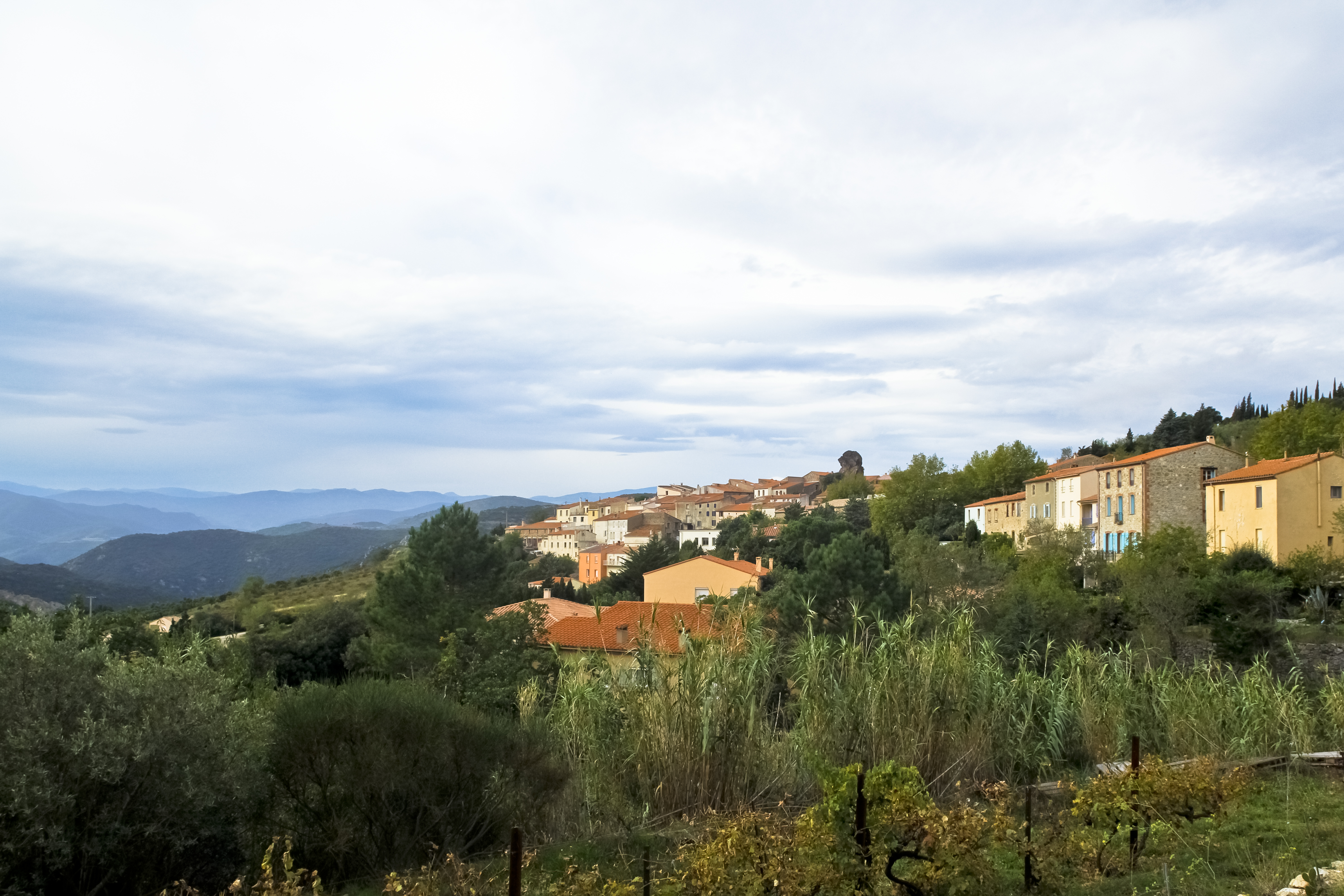 Le village de Lesquerde, Pyrénées-Orientales